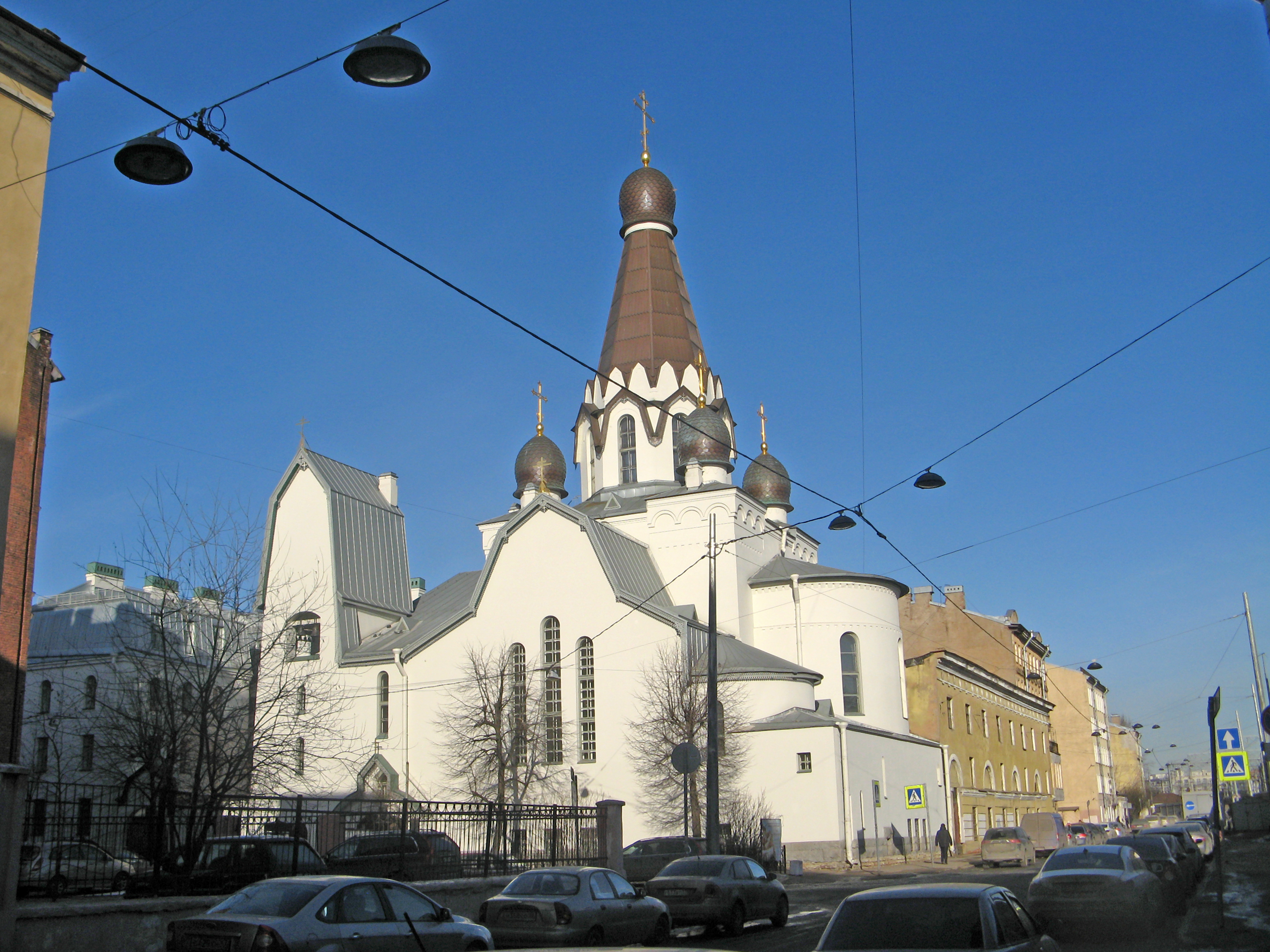 Здание подворья с церковью Святого Петра Митрополита: Роменская улица, 12, Днепропетровская улица, 19, Центральный район, Санкт-Петербург